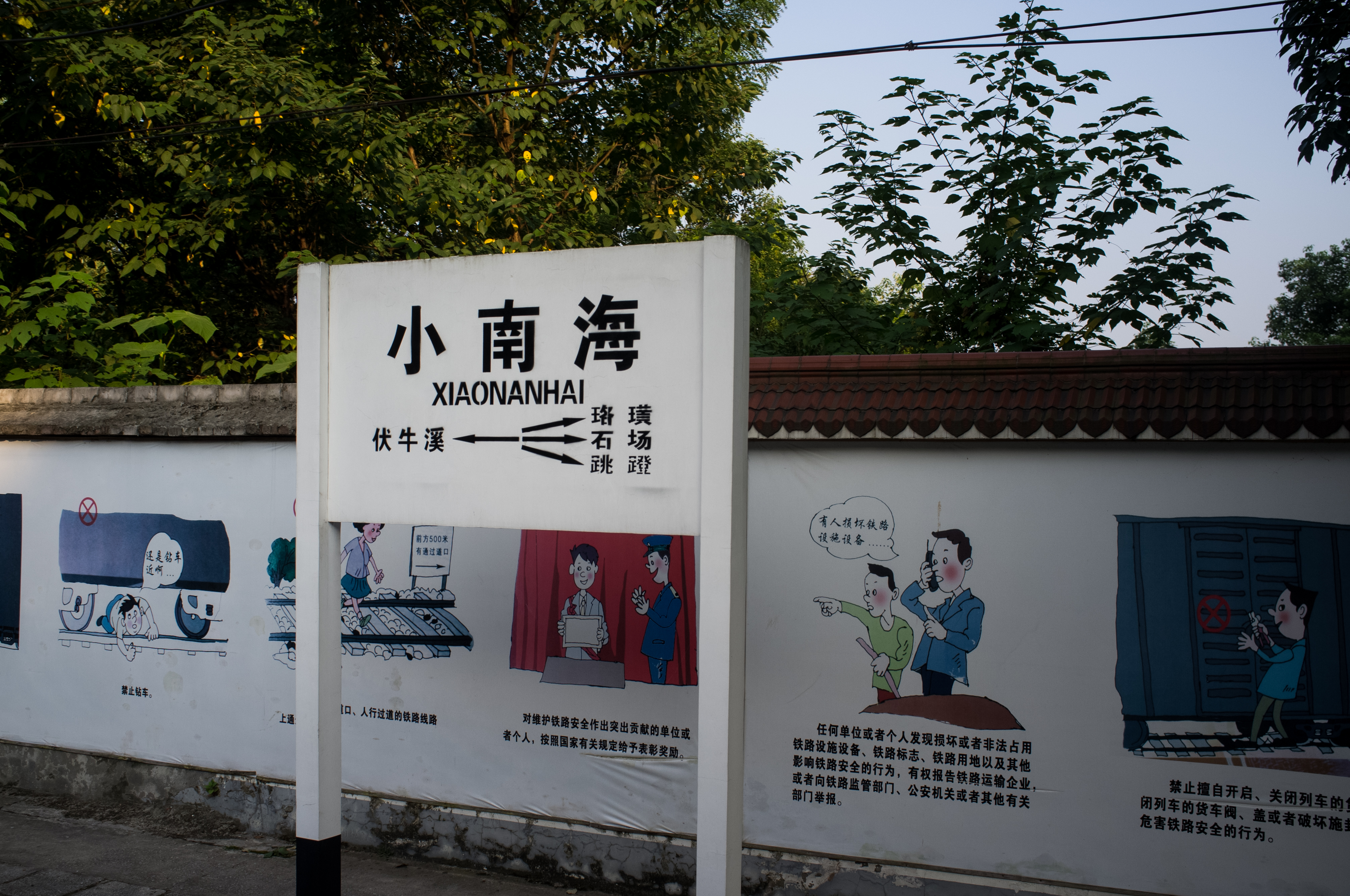 中文（中国大陆）: 成渝铁路小南海站